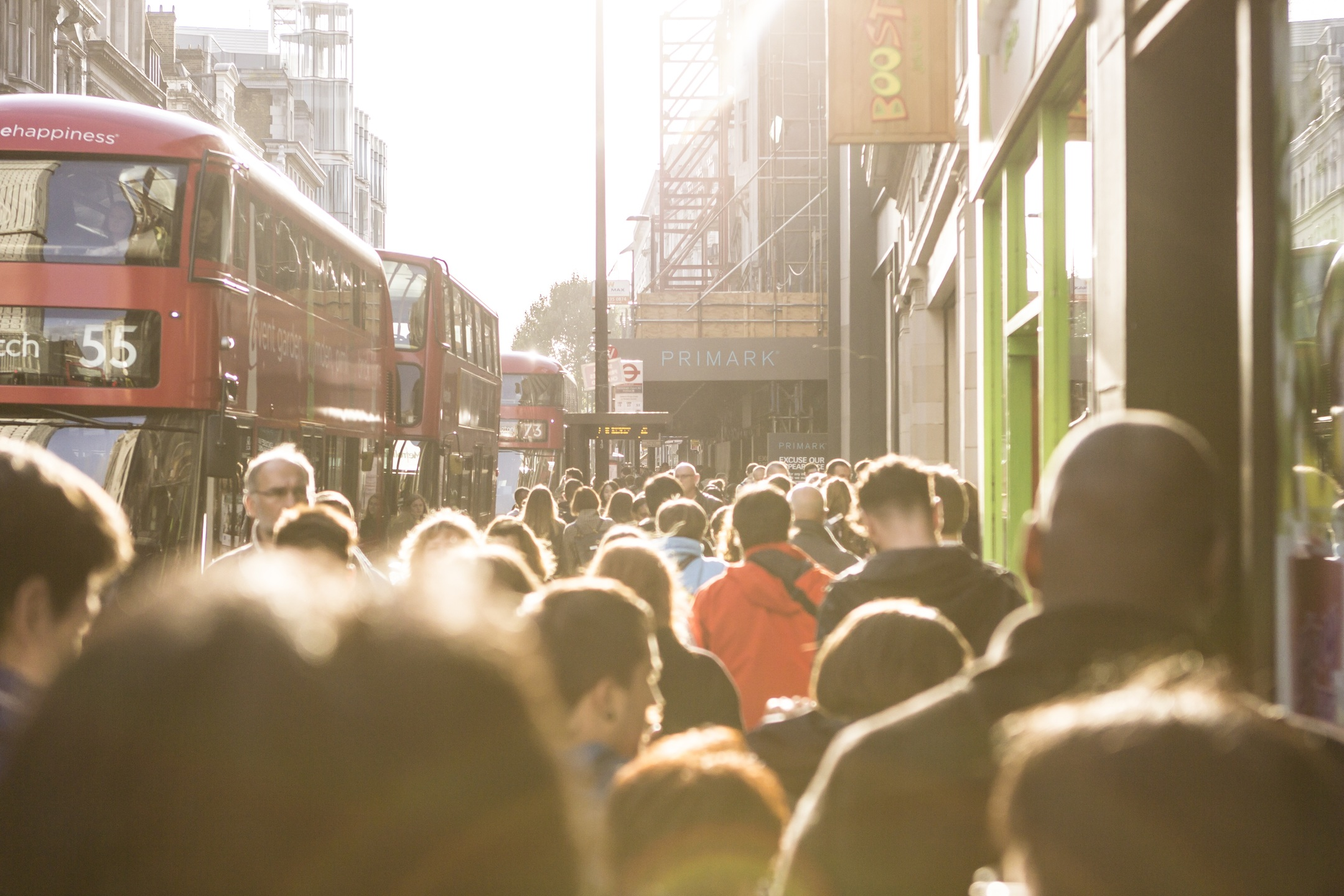 ciudad, urbano, multitud, Paisaje urbano, turista, Reino Unido, Inglaterra, Londres, británico, Gran Bretaña, Ciudad de londres, Calle londres